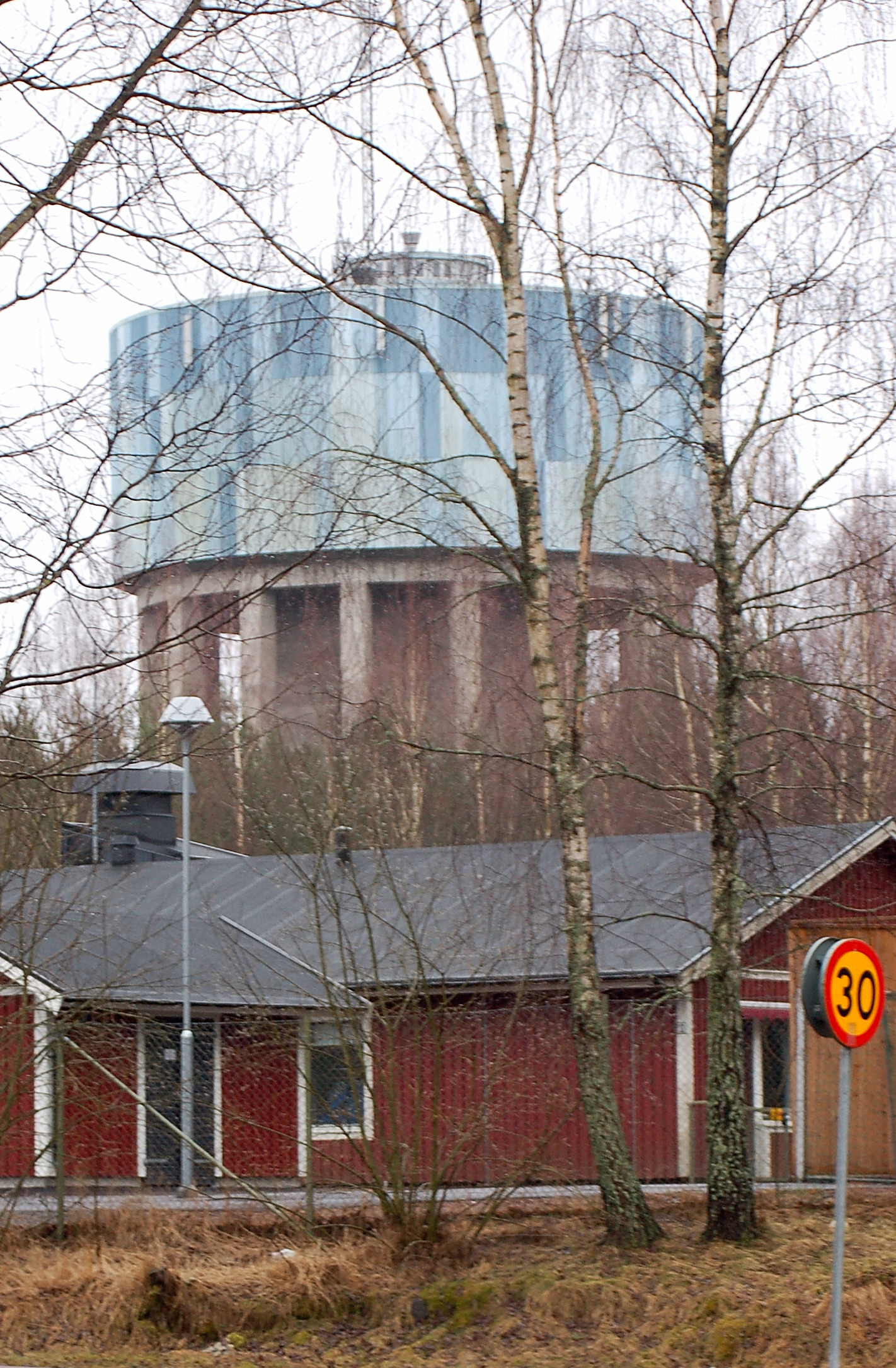 Vattentornet på Kronoparken, uppfördes 1965, för ritning och konstruktion svarade Vattenbyggnadsbyrån.